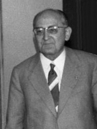 Title: Berlin, Besuch Egon Bahr bei Otto Winzer Factual corrections and alternative descriptions are encouraged separately from the original description. Additionally errors can be reported at this page to inform the Bundesarchiv. Original historic description: ADN-Bildarchiv-Spremberg 28.6.1972 Berlin: Minister Winzer empfing Staatssekretär Bahr- Der Minister für Auswärtige Angelegenheit der DDR, Otto Winzer (2.v.l.), empfing am 28.6.72 den Staatssekretär im Bundeskanzleramt der BRD, Egon Bahr (l.), zu einem Gespräch über Fragen in Zusammenhang mit dem Meinungsaustausch zwischen der DDR und der BRD. Die Unterredung, an der der Staatssekretär beim Ministerrat der DDR, Dr. Michael Kohl (r) teilnahm, kam auf beiderseitigem Wunsch zustande.